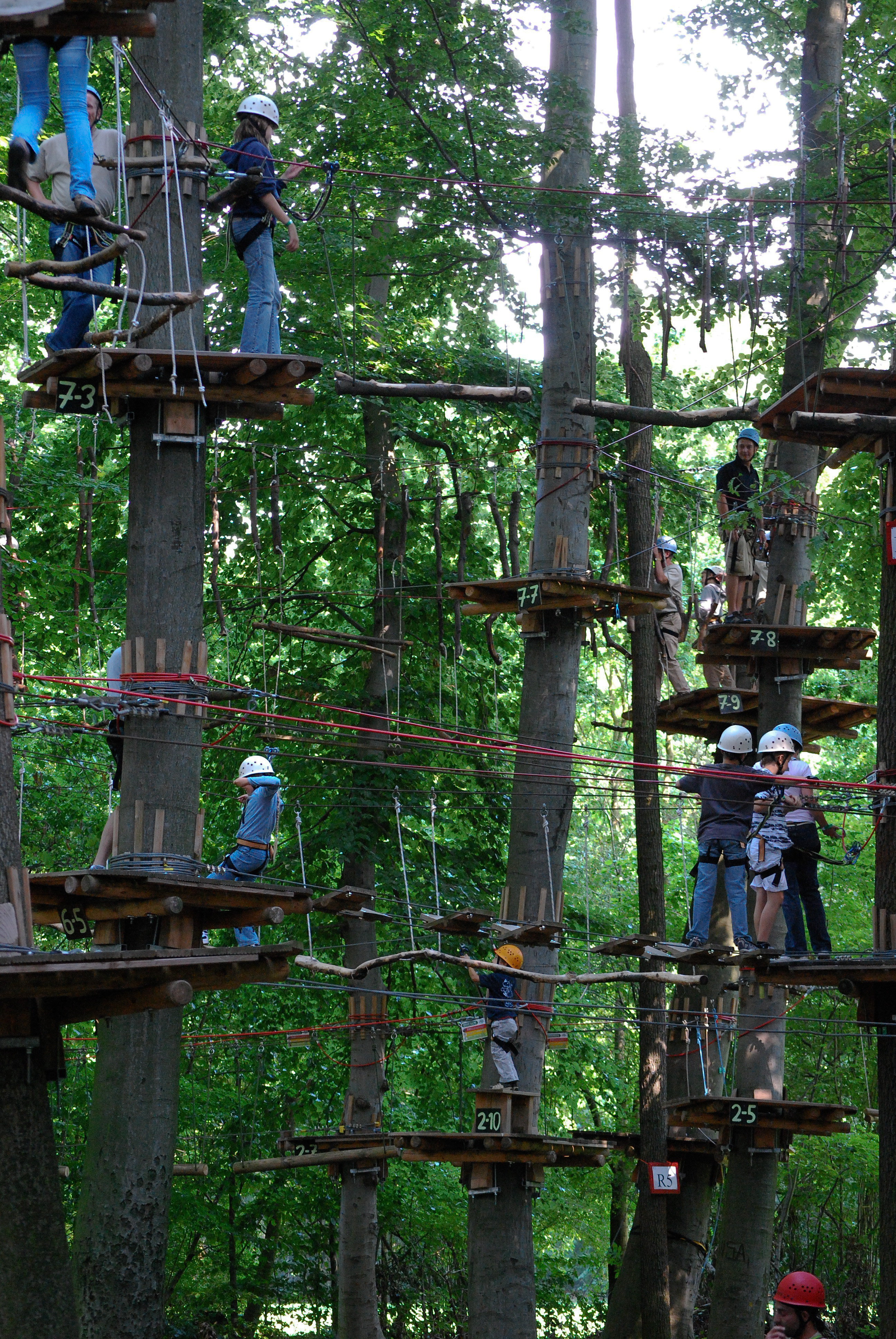 Leonhard-Eißnert-Park in Offenbach am Main - Kletterpark